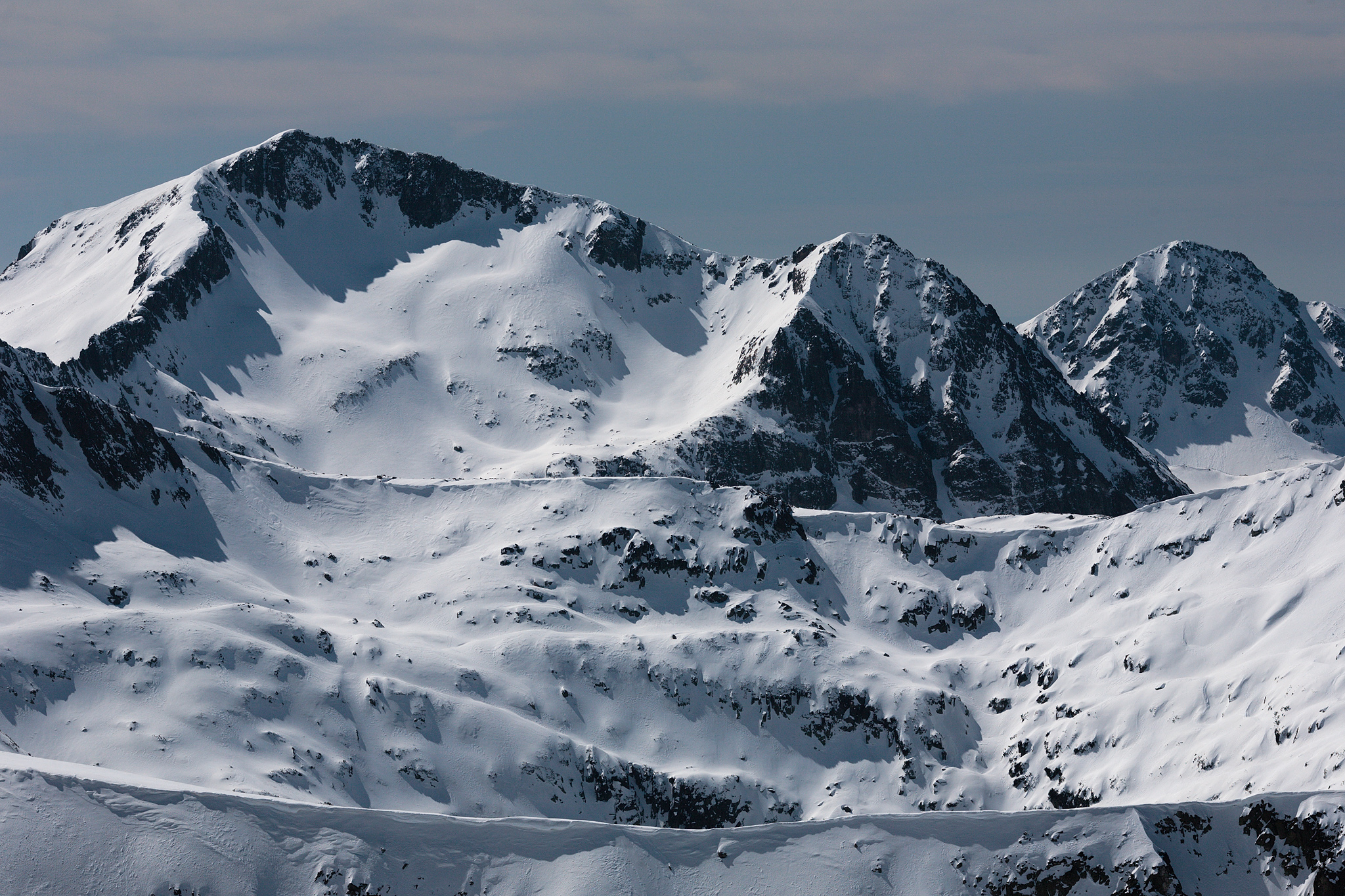 Пирин, Каменица в Пирин планина